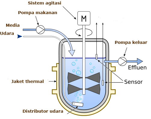 Bahasa indonesia: struktur skematik bioreaktor